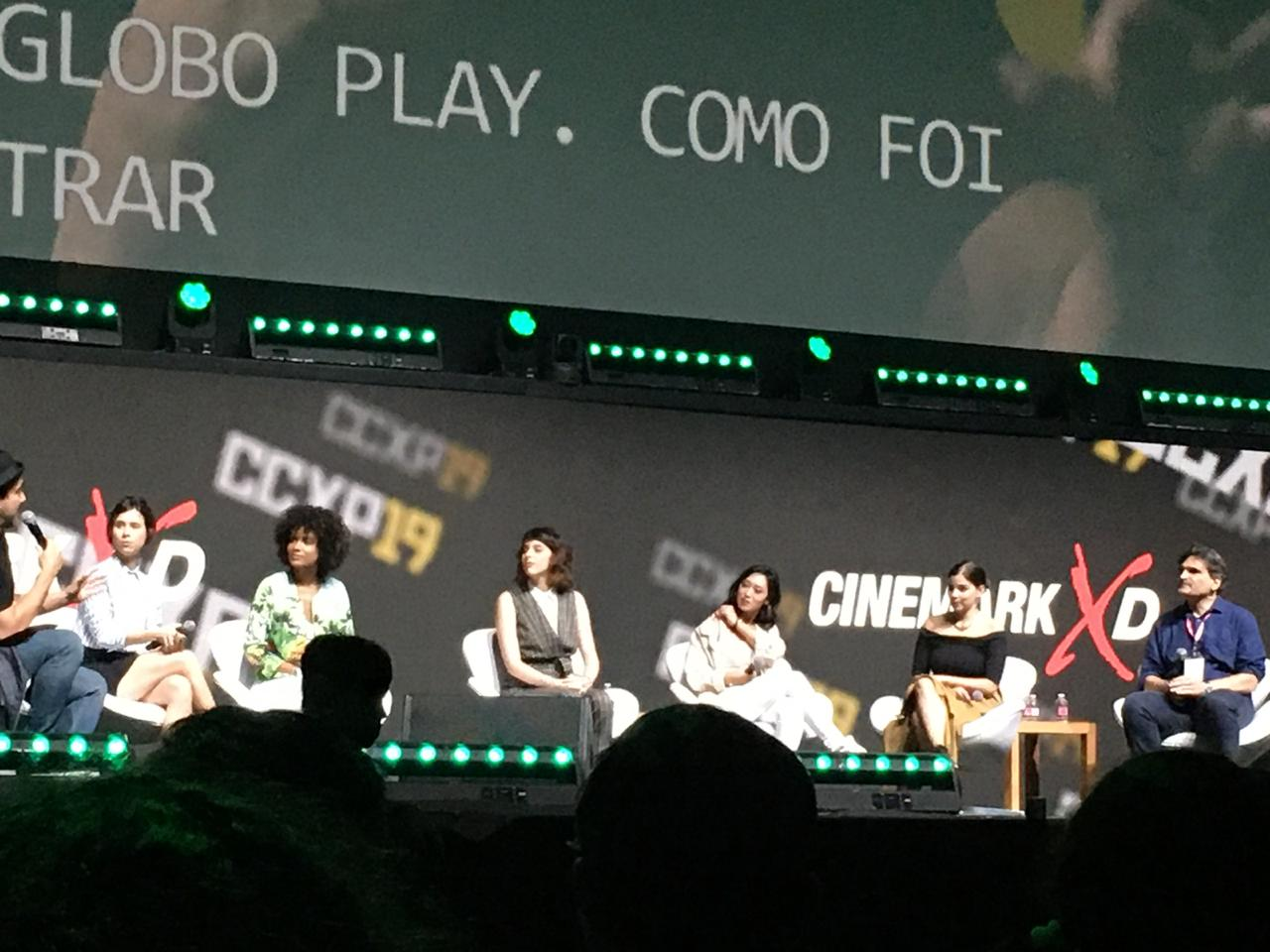 Atrizes e autor da série 'As Five' durante a CCXP 19.